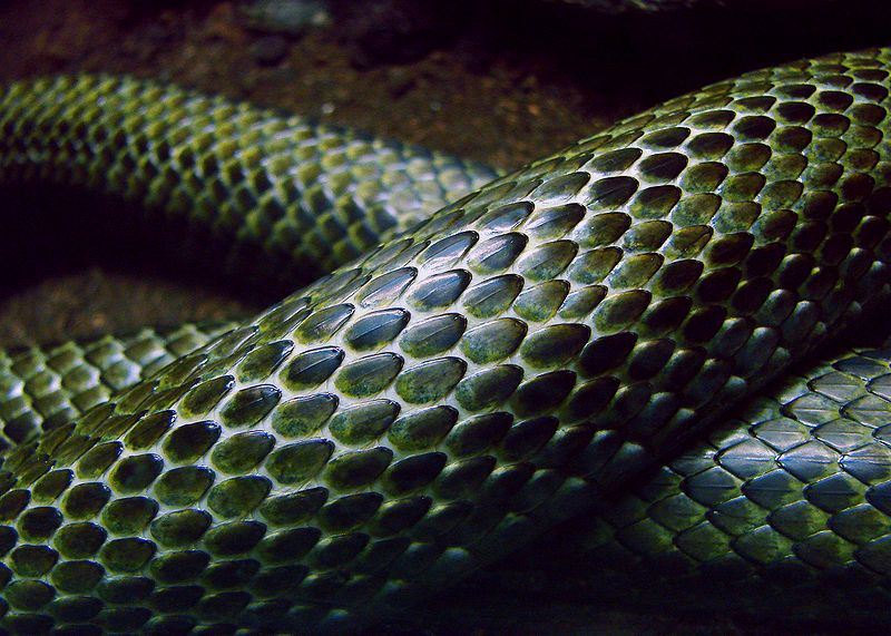 Détail des écailles d'un serpent-ratier du Japon ( Elaphe climaphora ). Il est présenté à l'Ile aux Serpents.